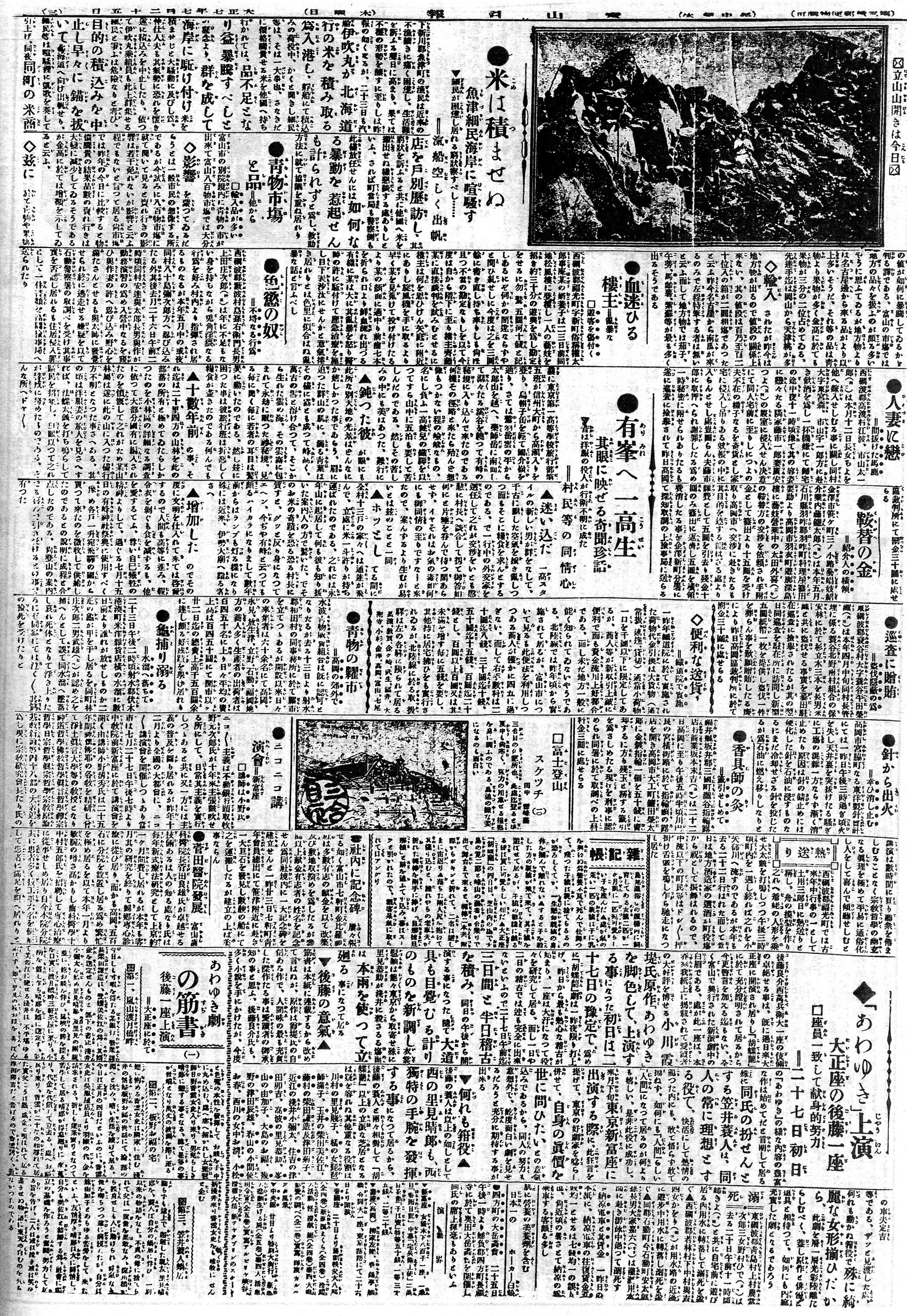 魚津にて細民の米積出しを妨害した旨を報ずる記事